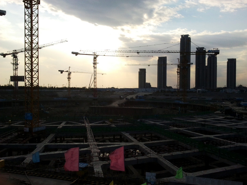 高银117大厦建设工地2011年10月15日